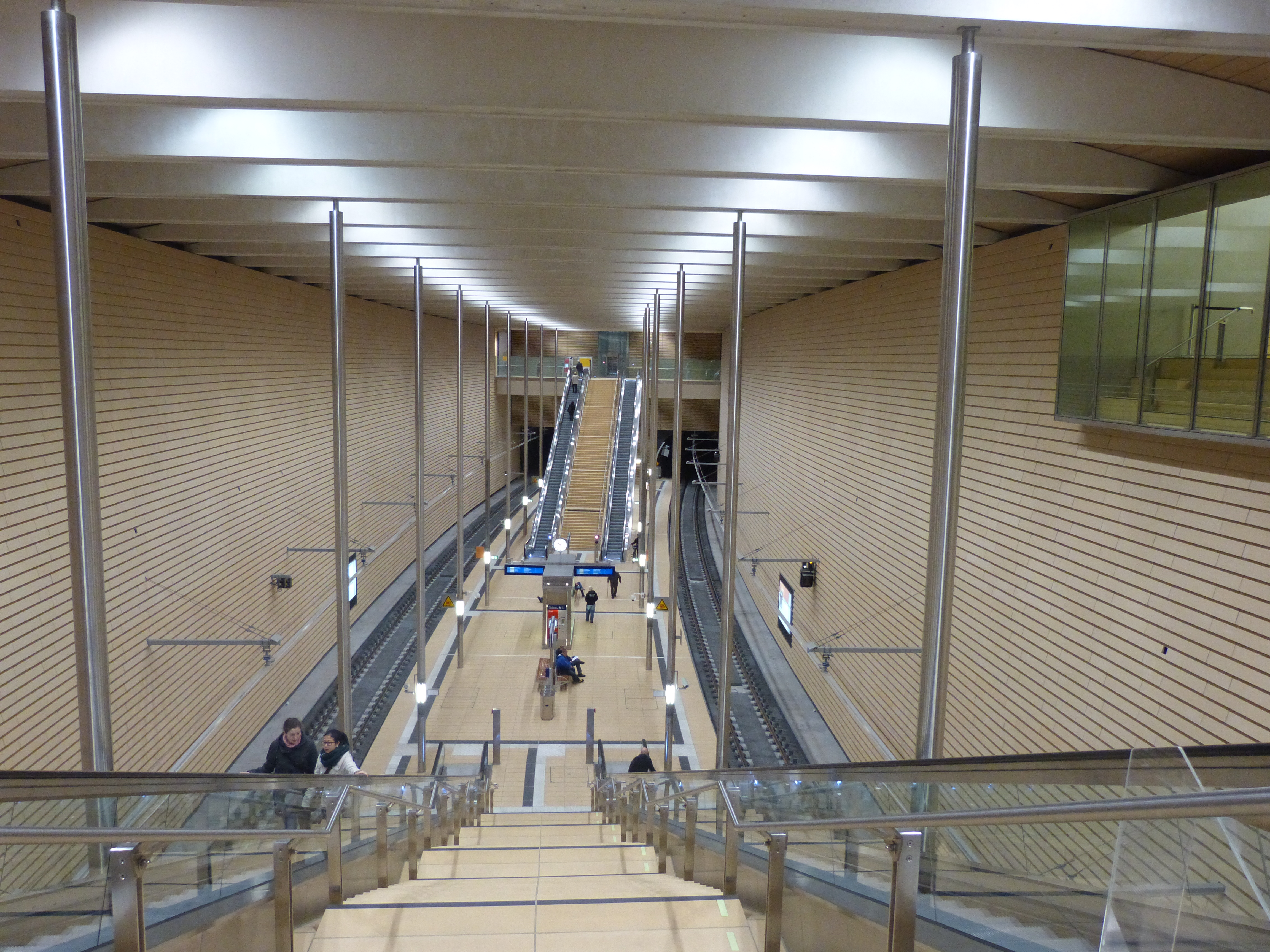 Leipzig Markt im Jahr 2014